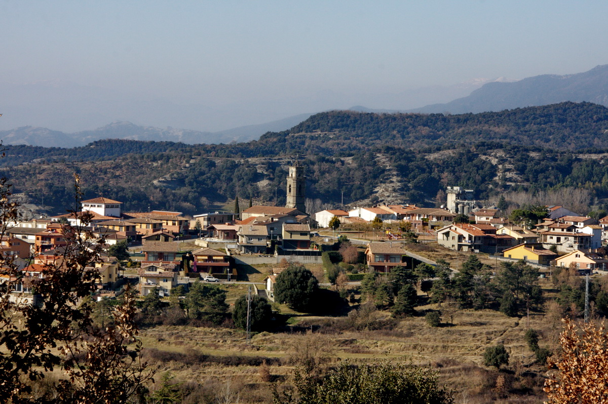 Vista general de Santa Maria de Corcó (Osona, Catalunya)